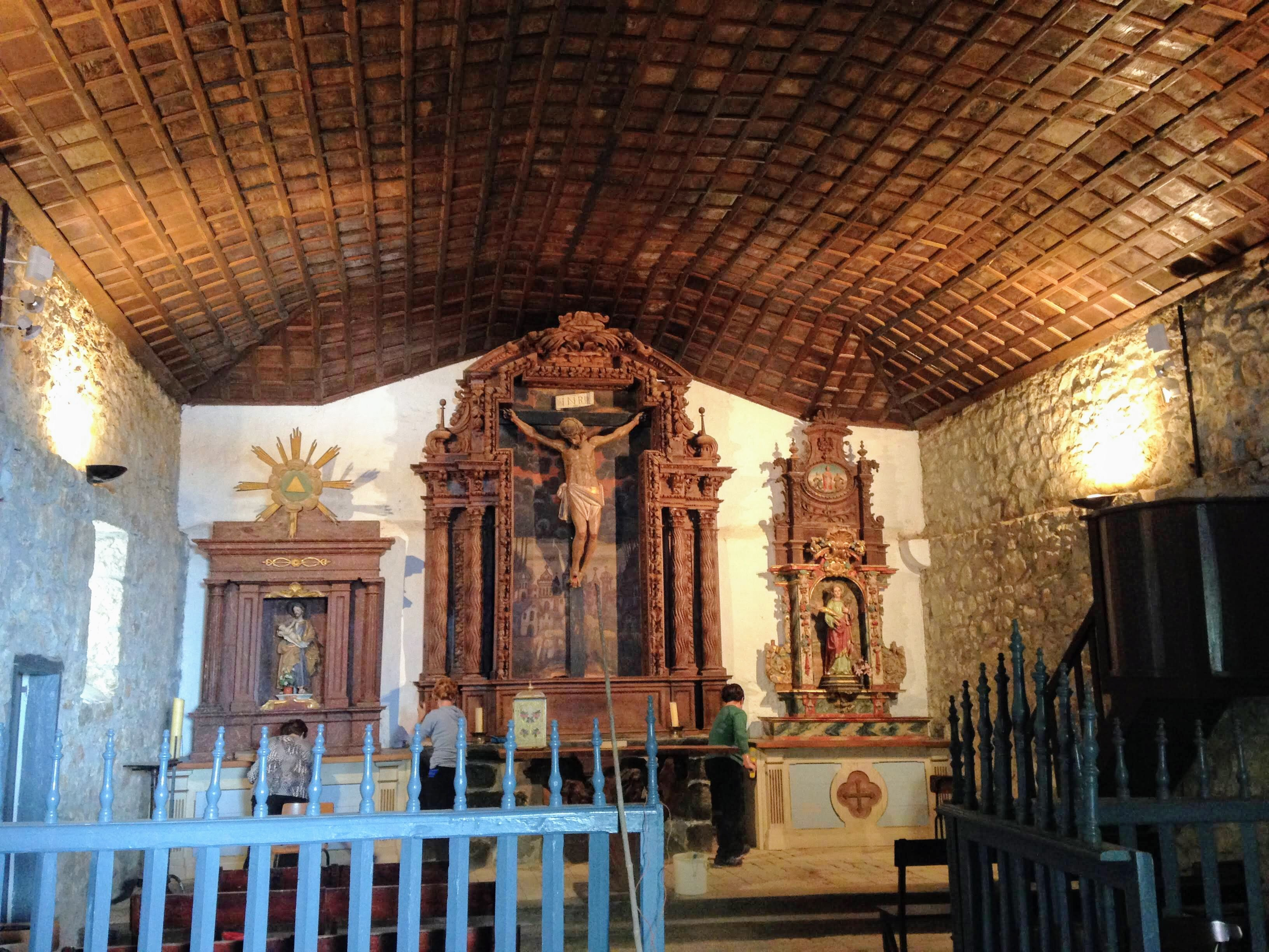 Santa Kruz baselizaren barnealdea eta erretaulak (Asteasu, Gipuzkoa)